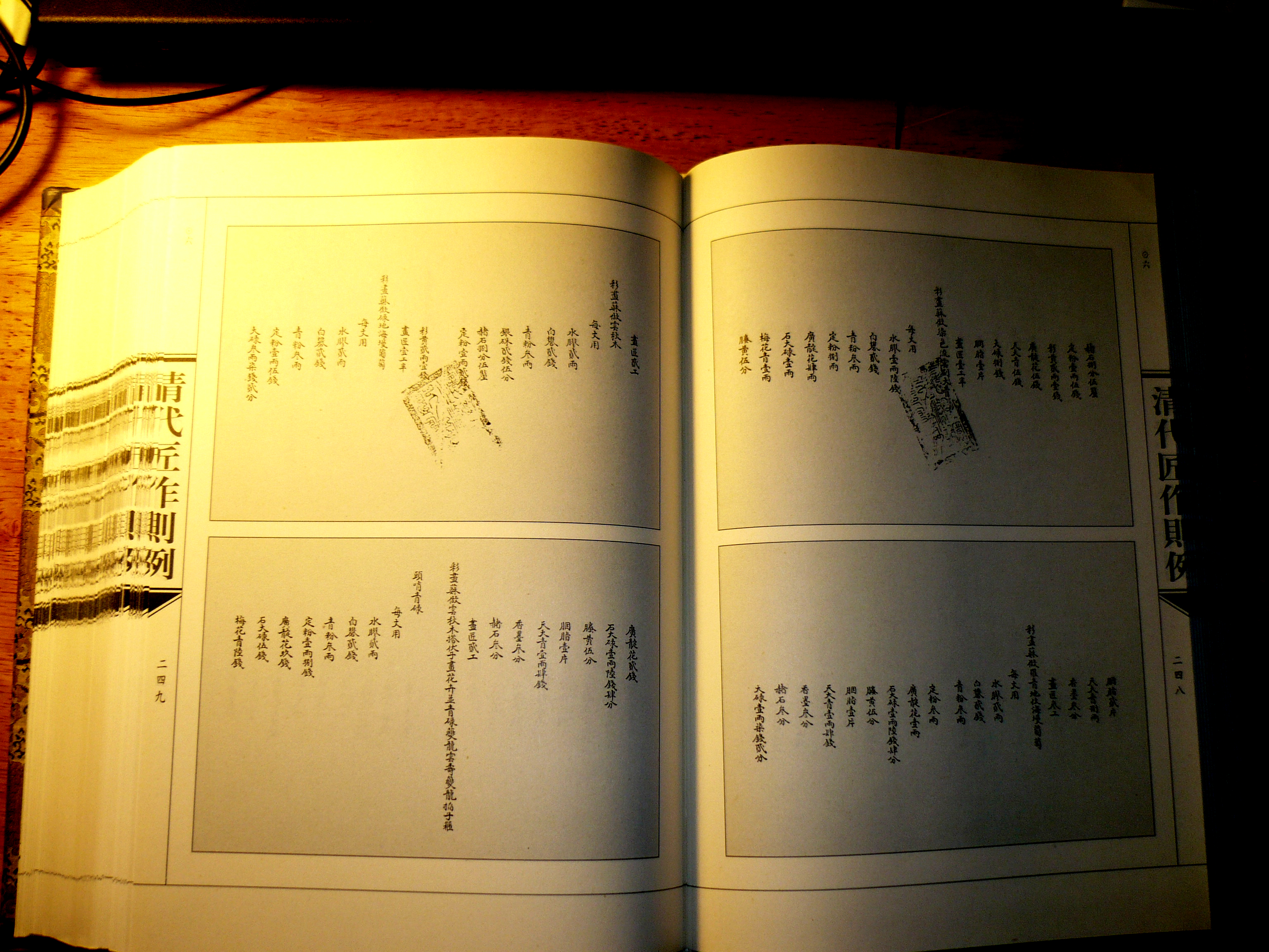 圆明园苏式彩画